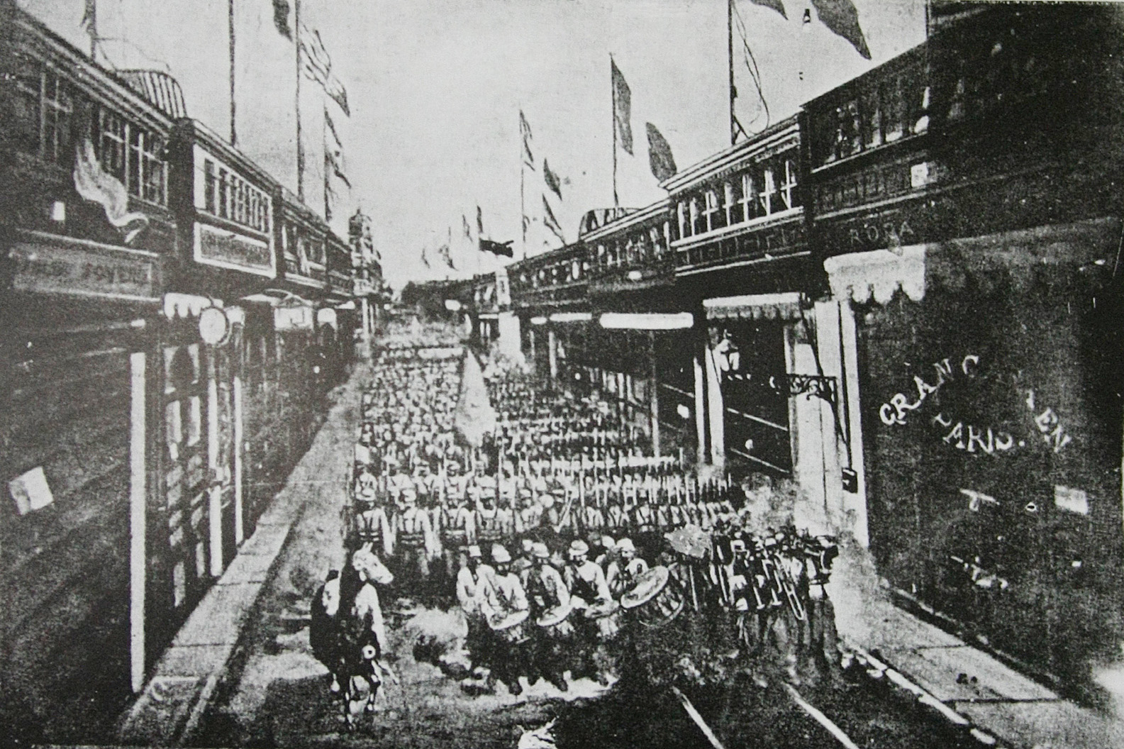 Entrada del ejército chileno a Lima. 17 de enero de 1881, durante la Guerra del Pacífico